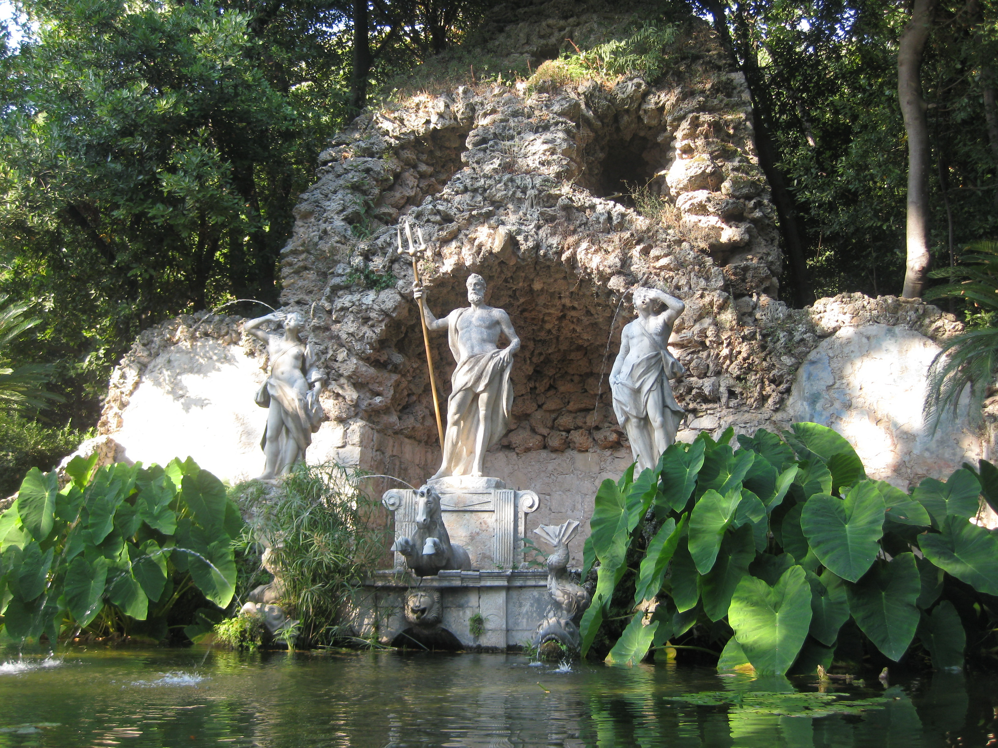 Fotografija Neptunove fontane u Trstenom